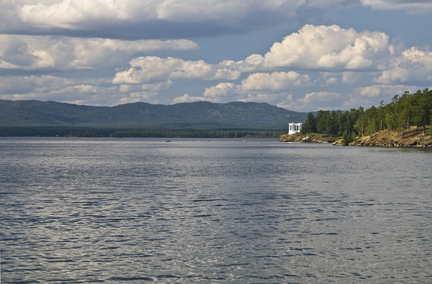 Озеро Иртяш. Озерск. Челябинская область. Россия.